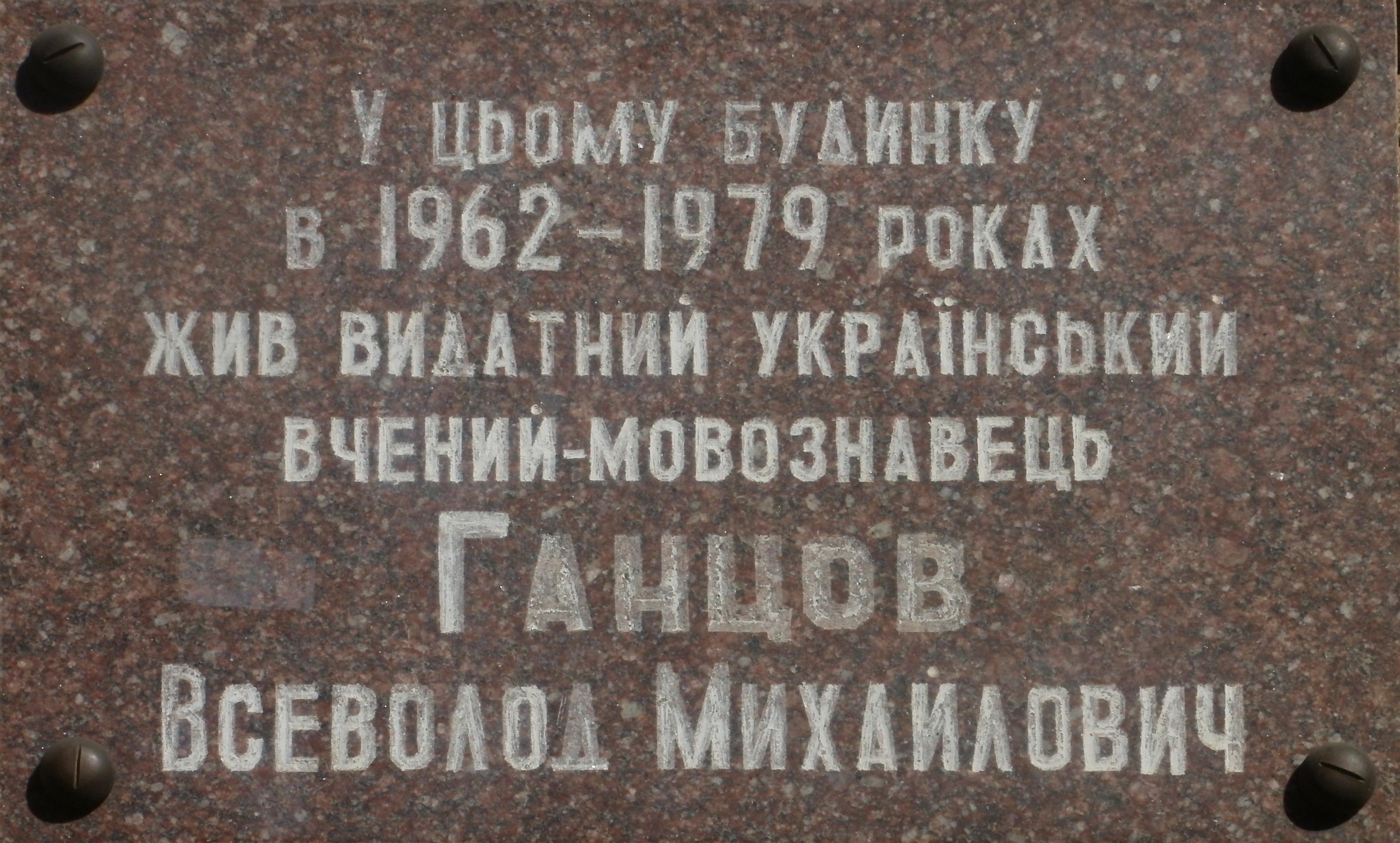 Меморіальна дошка на будинку, в якому жив останні роки відомий вчений-мовознавець, лінгвіст Ганцов В.М. (1892-1979рр.), Чернігів, проспект Миру, 35